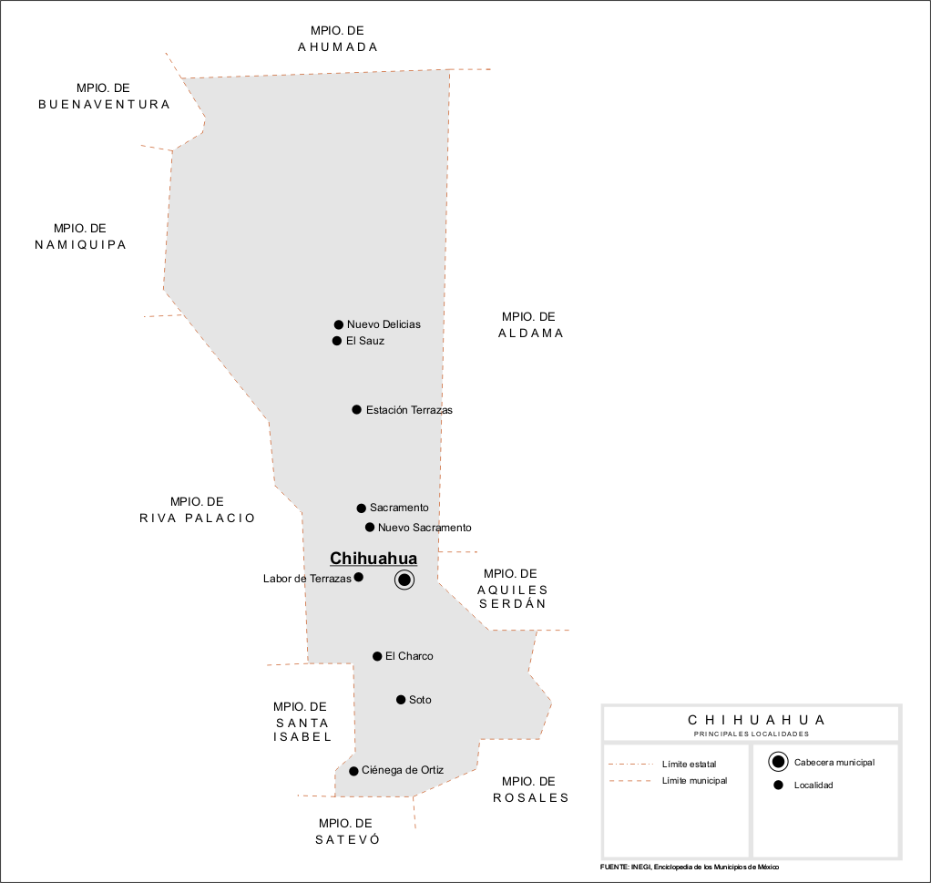 Mapa de las principales localidades del Municipio de Chihuahua en el estado de Chihuahua, México.